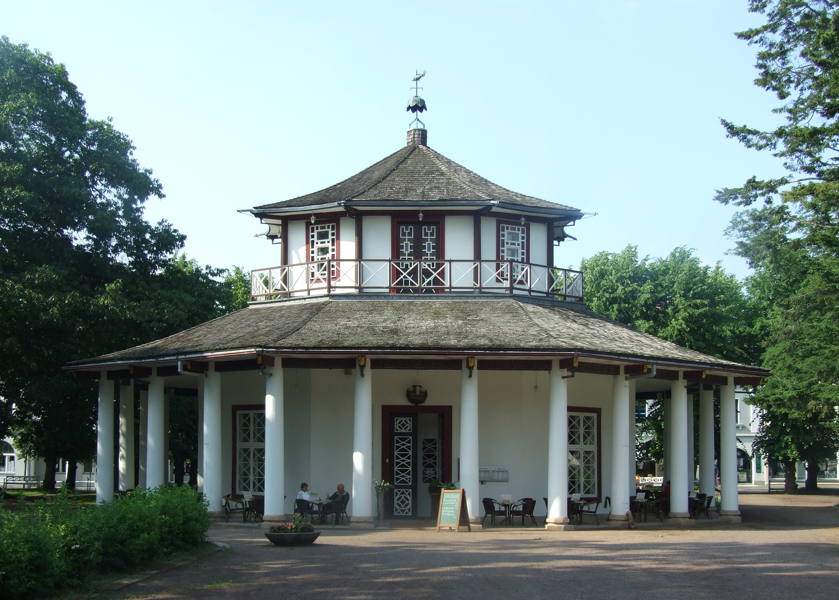 Weißer Pavillon; Kamp Bad Doberan